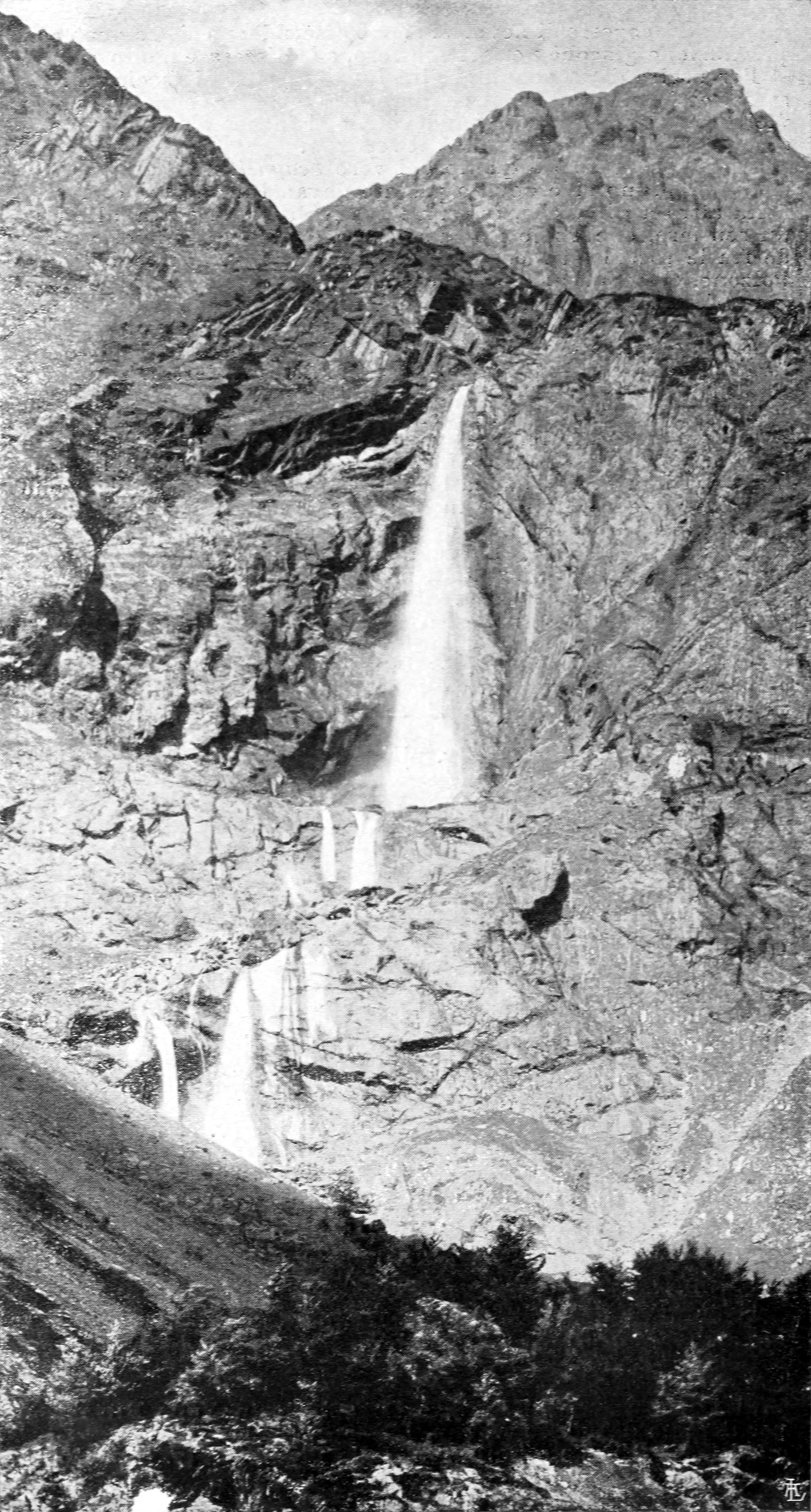 Immagine dal libro Bergamo e sue valli, Brescia e sue valli, Lago d'Iseo, Valcamonica, Società Anonima Guide Lampugnani, Milano, 1900 - Cascate del Serio